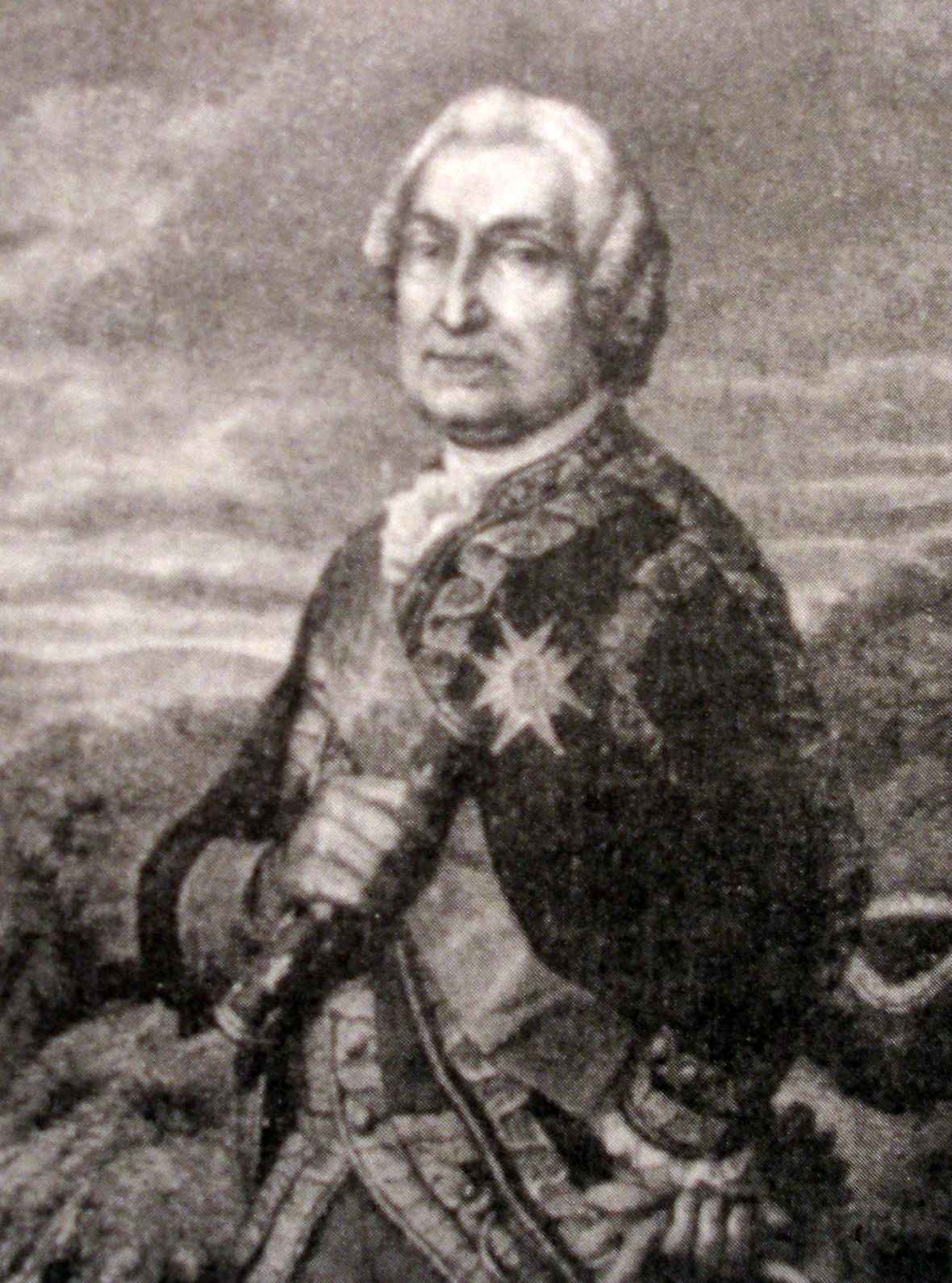 Maršal Francúzska, gróf Ladislava Berčení, bol majiteľom a veliteľom husárskeho pluku, ktorý v rokoch 1721 - 1791 pôsobil v zostave francúzskej armády. Maršal Ladislav Berčéni bol uhorský rodák, ktorý sa narodil v meste Prešov.